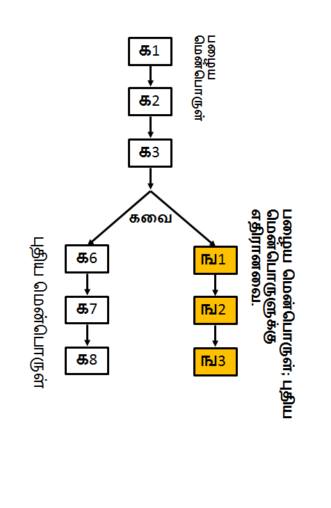 கட்டச்சங்கிலியில் மென்கவை தோற்றம்